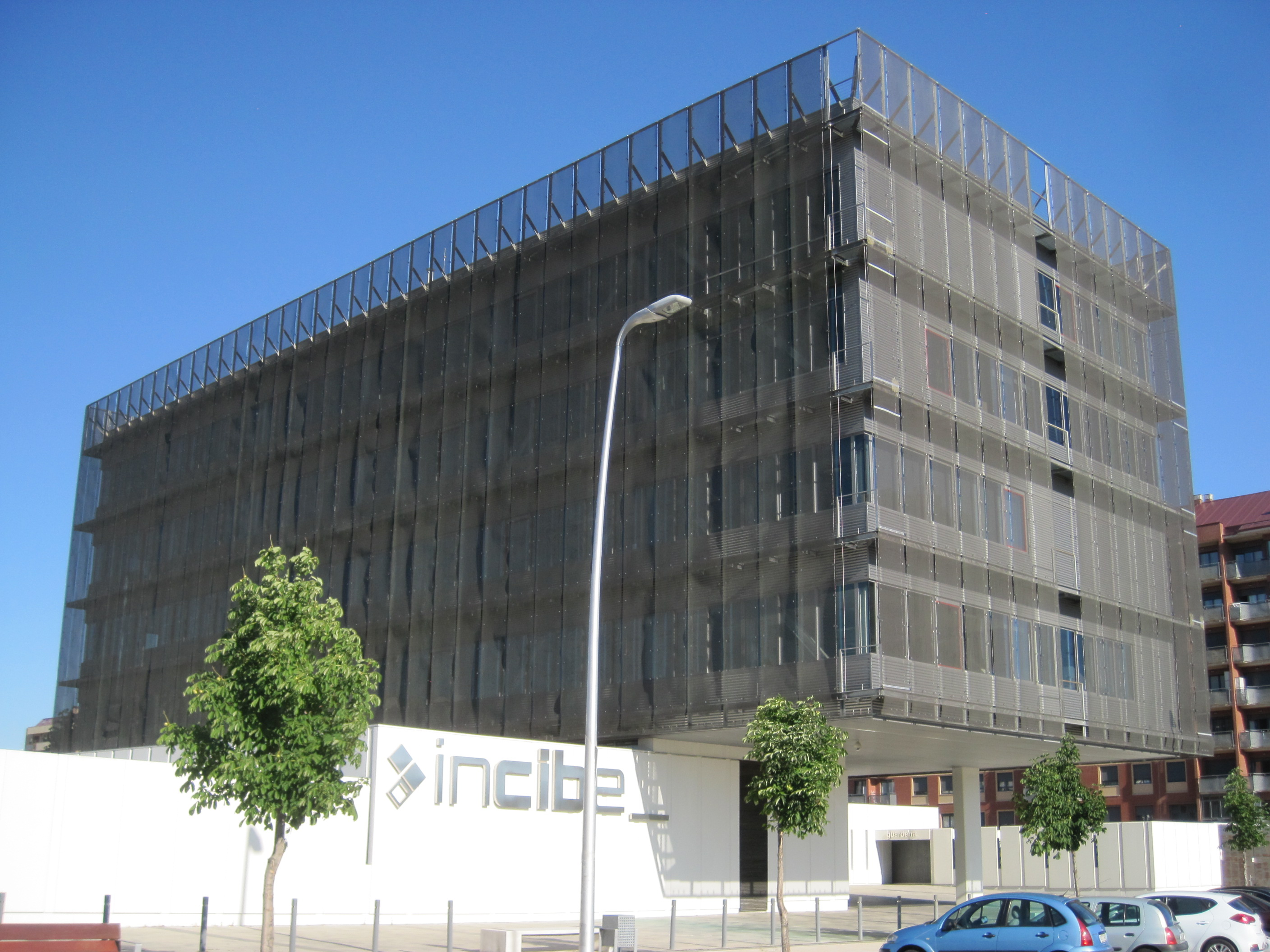 Edificio del Instituto Nacional de Ciberseguridad (INCIBE), en León (España).